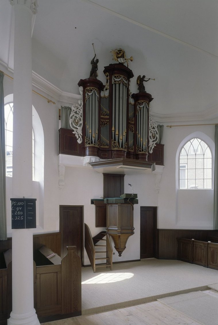 Doopsgezinde kerk: Interieur, aanzicht orgel, orgelnummer 198 (opmerking: Gefotografeerd voor Het Historische Orgel in Nederland 1790-1818)